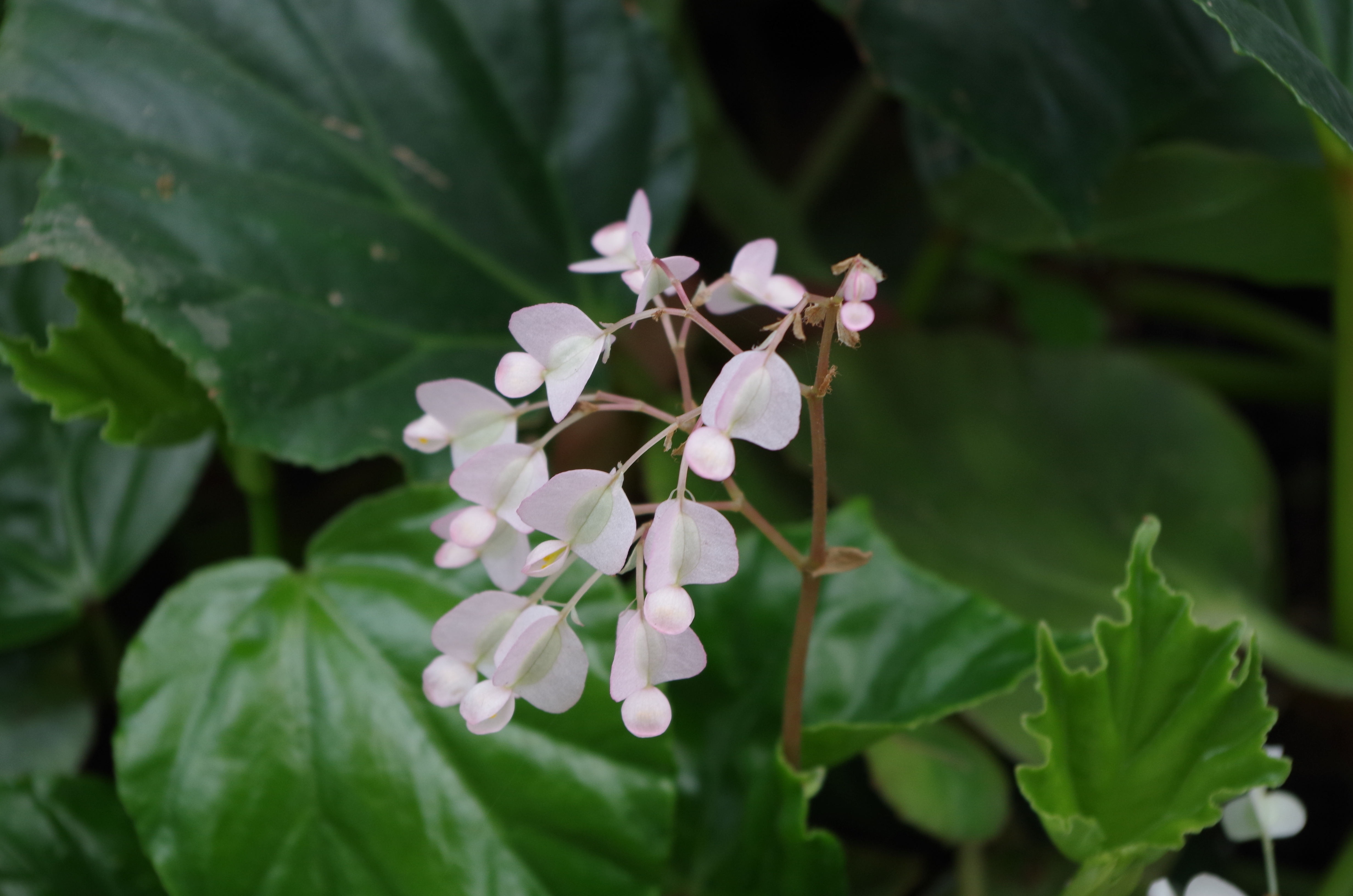 Convolvulacea - Kew Gardens